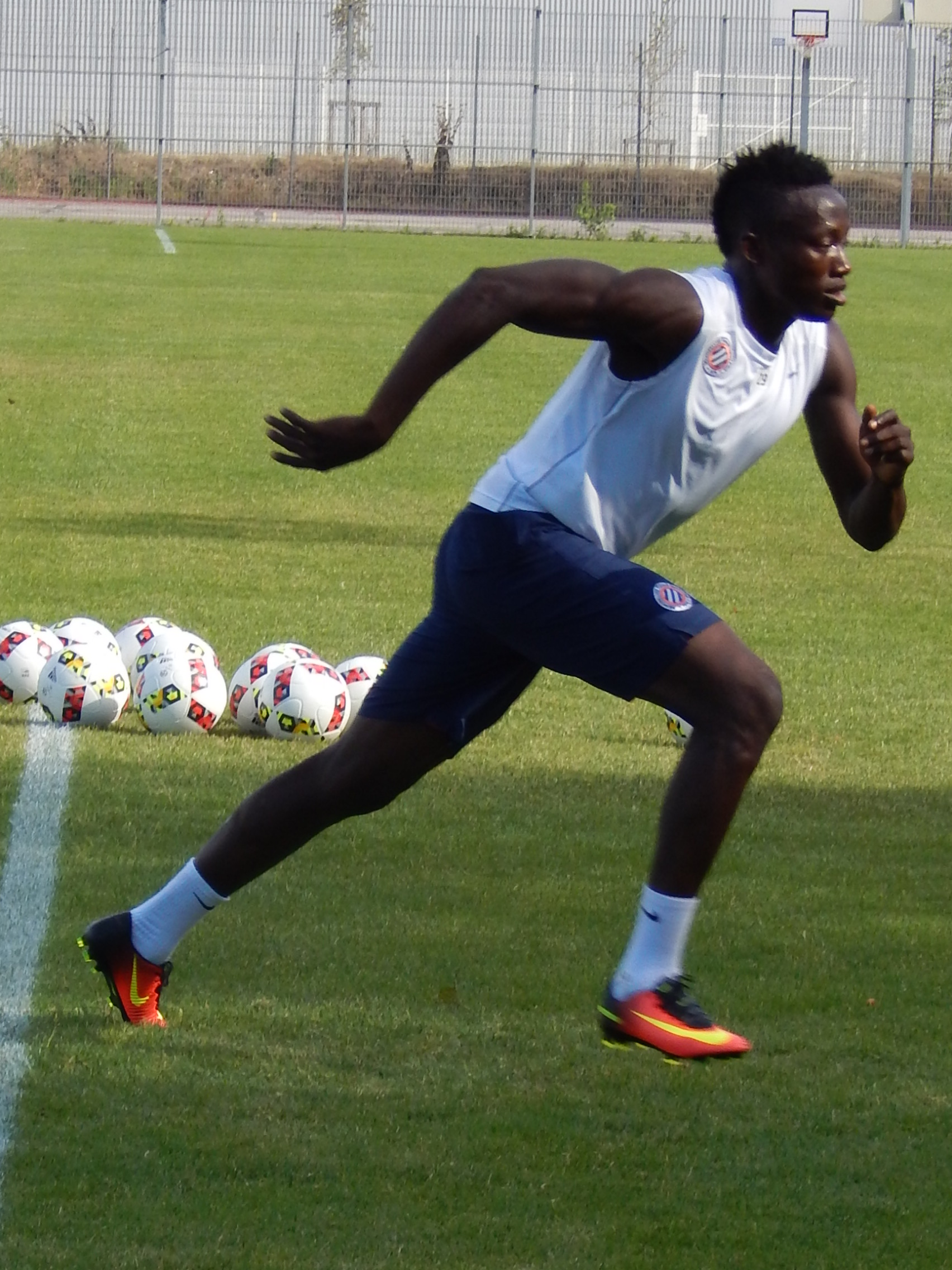 Rodrigue Casimir Ninga (Montpellier), juillet 2016.